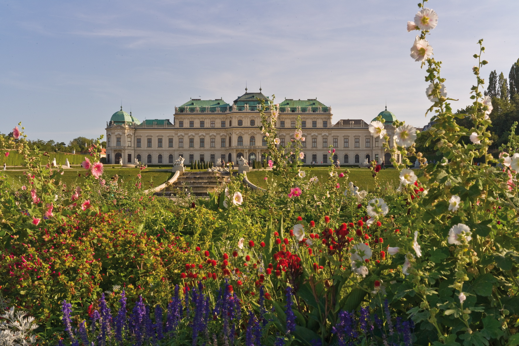 Blick vom Schlossgarten auf die nördliche Fassade des Oberen Belvederes